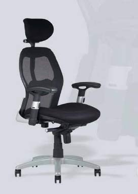 Ergonomická židle s prvky aktivního sezení. Nepřesně nazývaná, kancelářská židle.